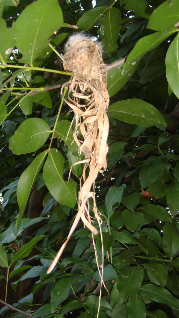 Nido en un patio Cubano de Mellisuga helenae, Zunzuncito